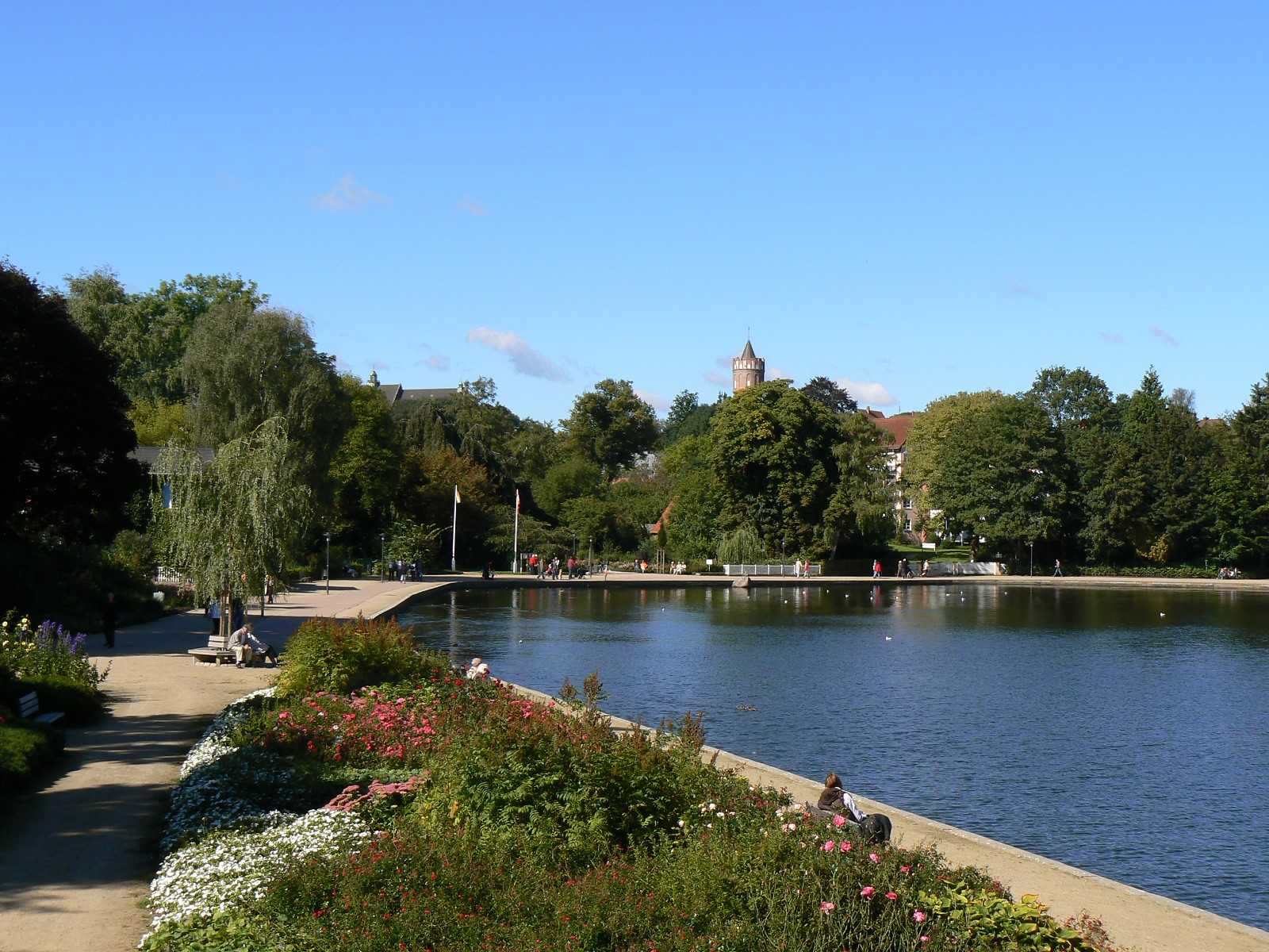 Seepromenade von Eutin. Im Hintergrund der neugotische Wasserturm von 1909.